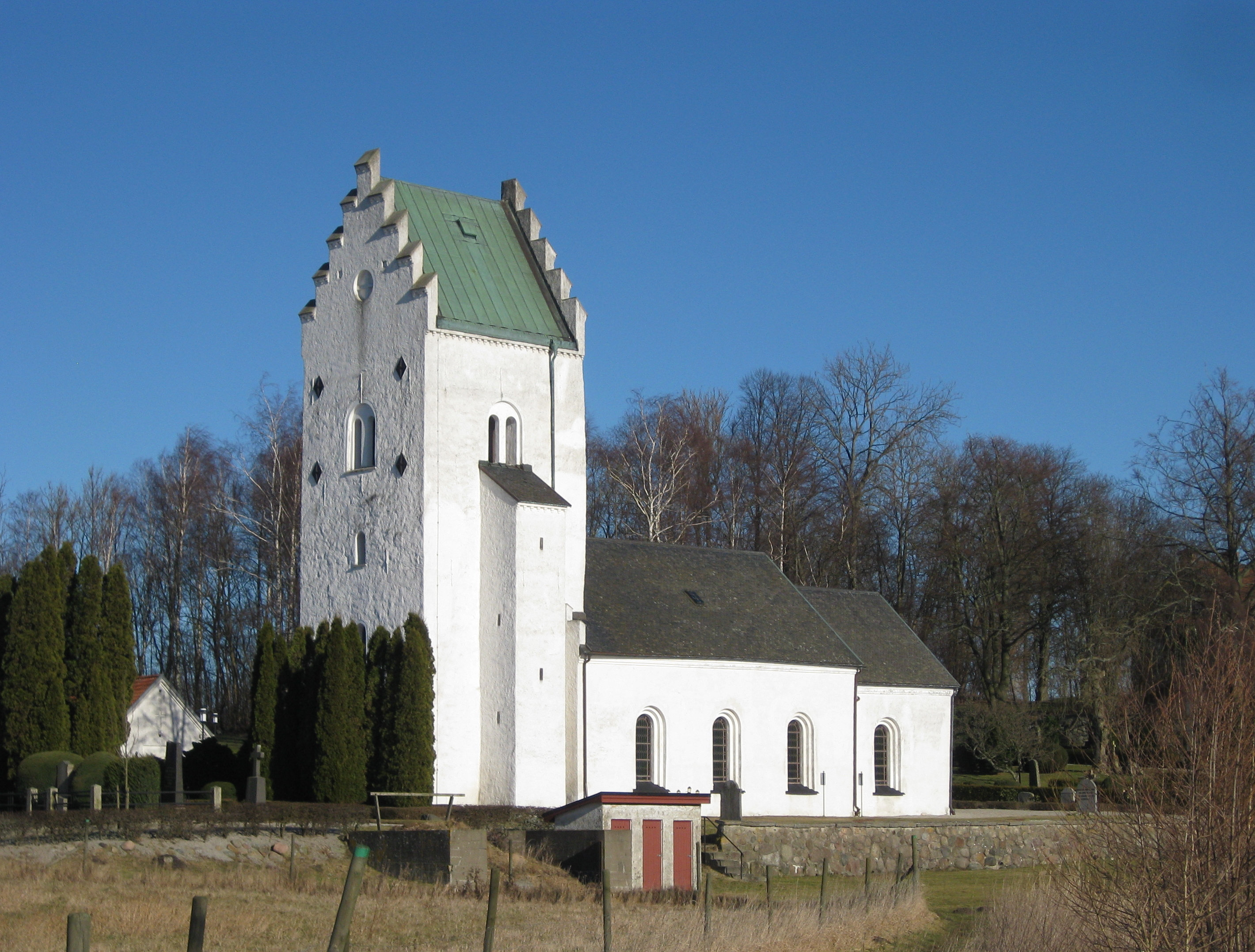 Gårdstånga kyrka i Skåne